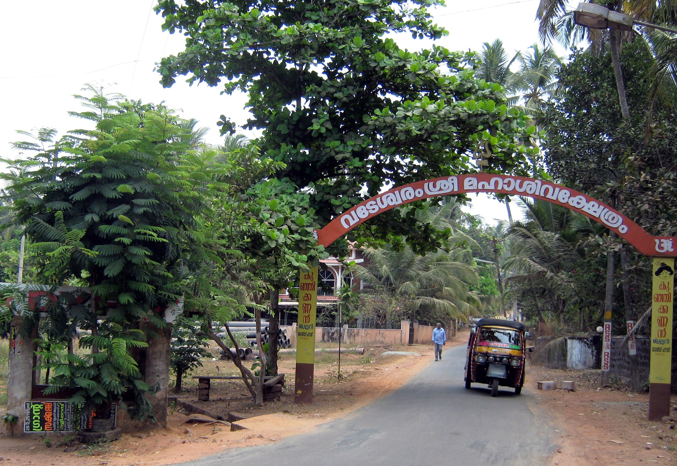 Kannur, Kerala, India.